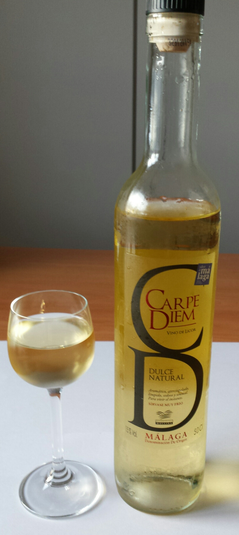 Vino dulce natural